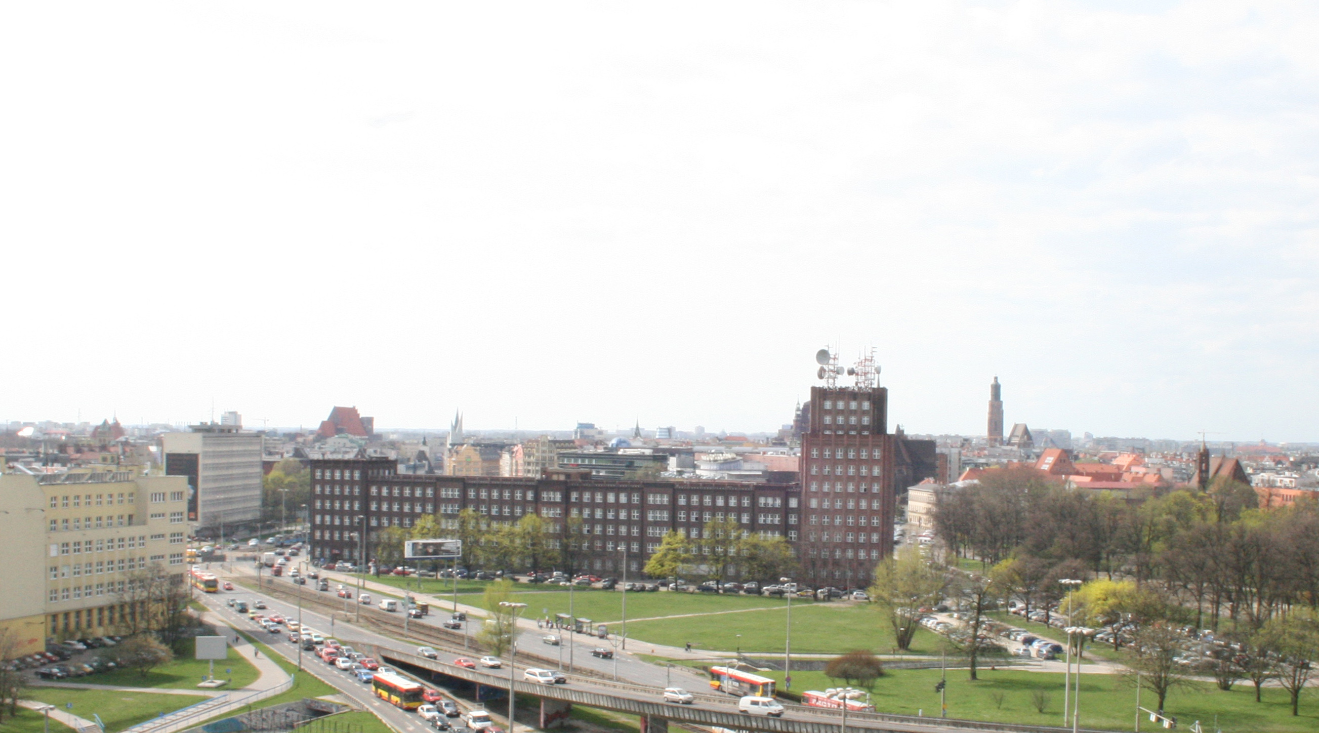 widok na Poczte Glowna z lotu ptaka